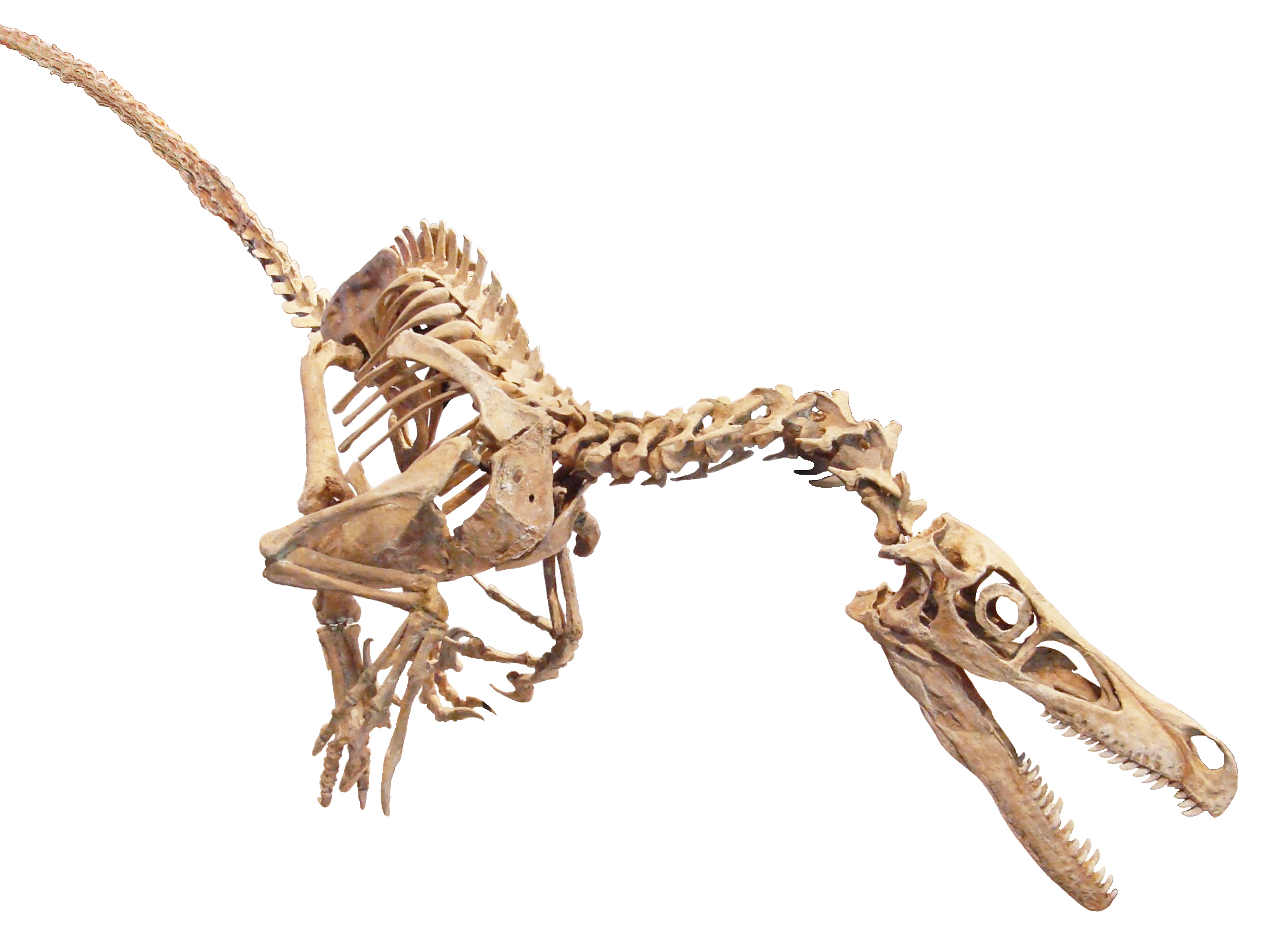 Velociraptor skeleton